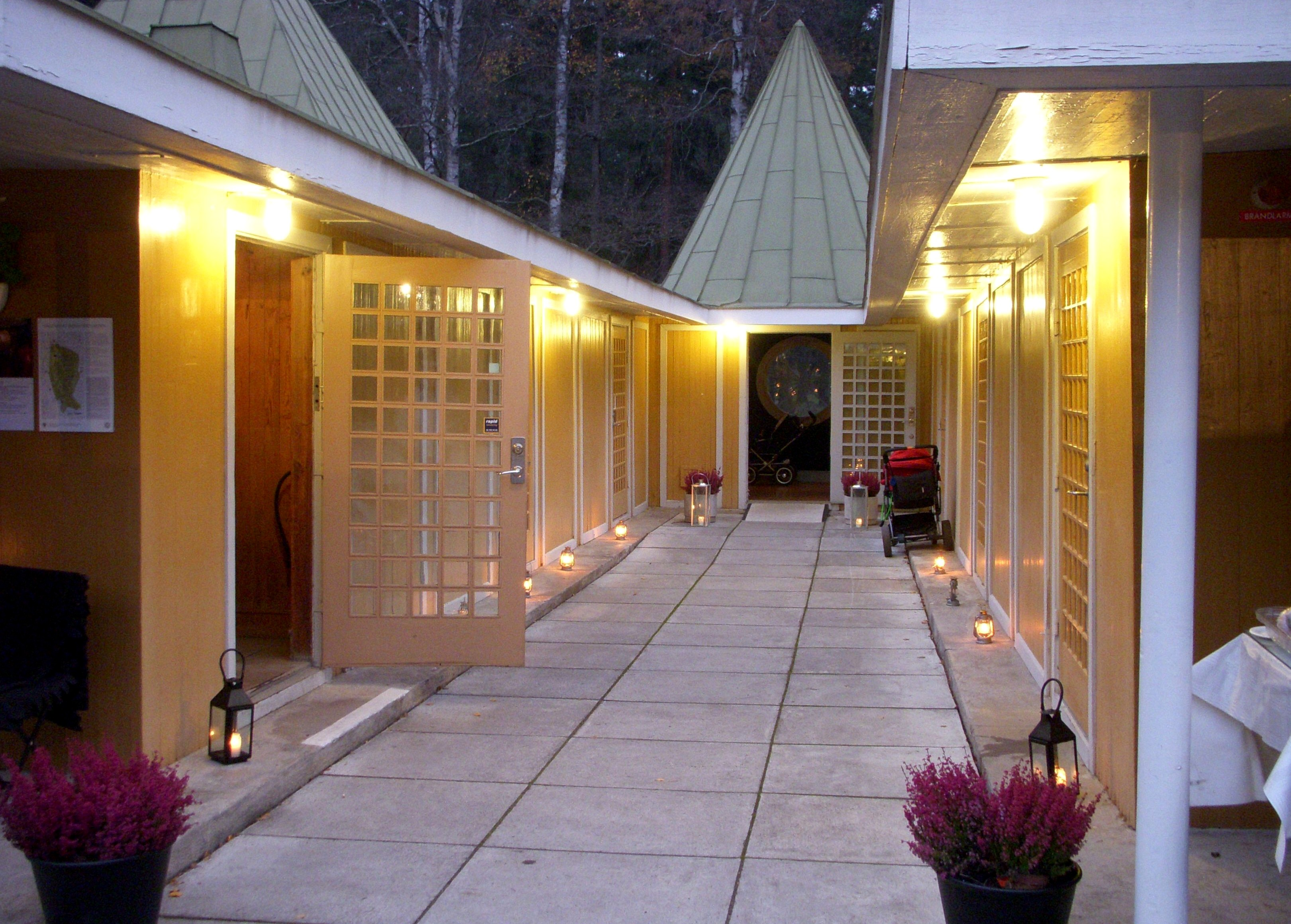 Skogskyrkogården i Stockholm, Tallumpaviljongen